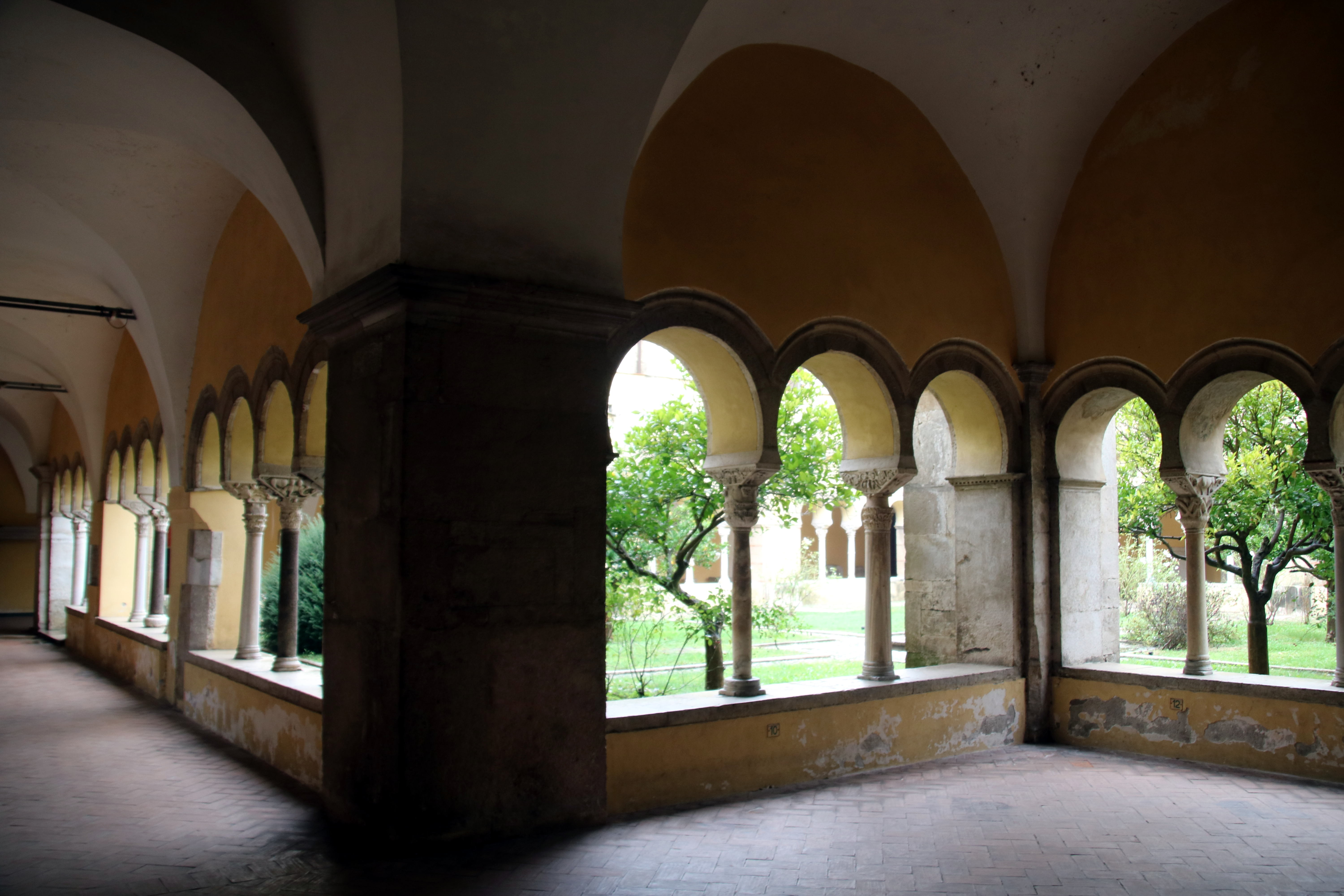 Chiostro, chiesa di Santa Sofia (Benevento)